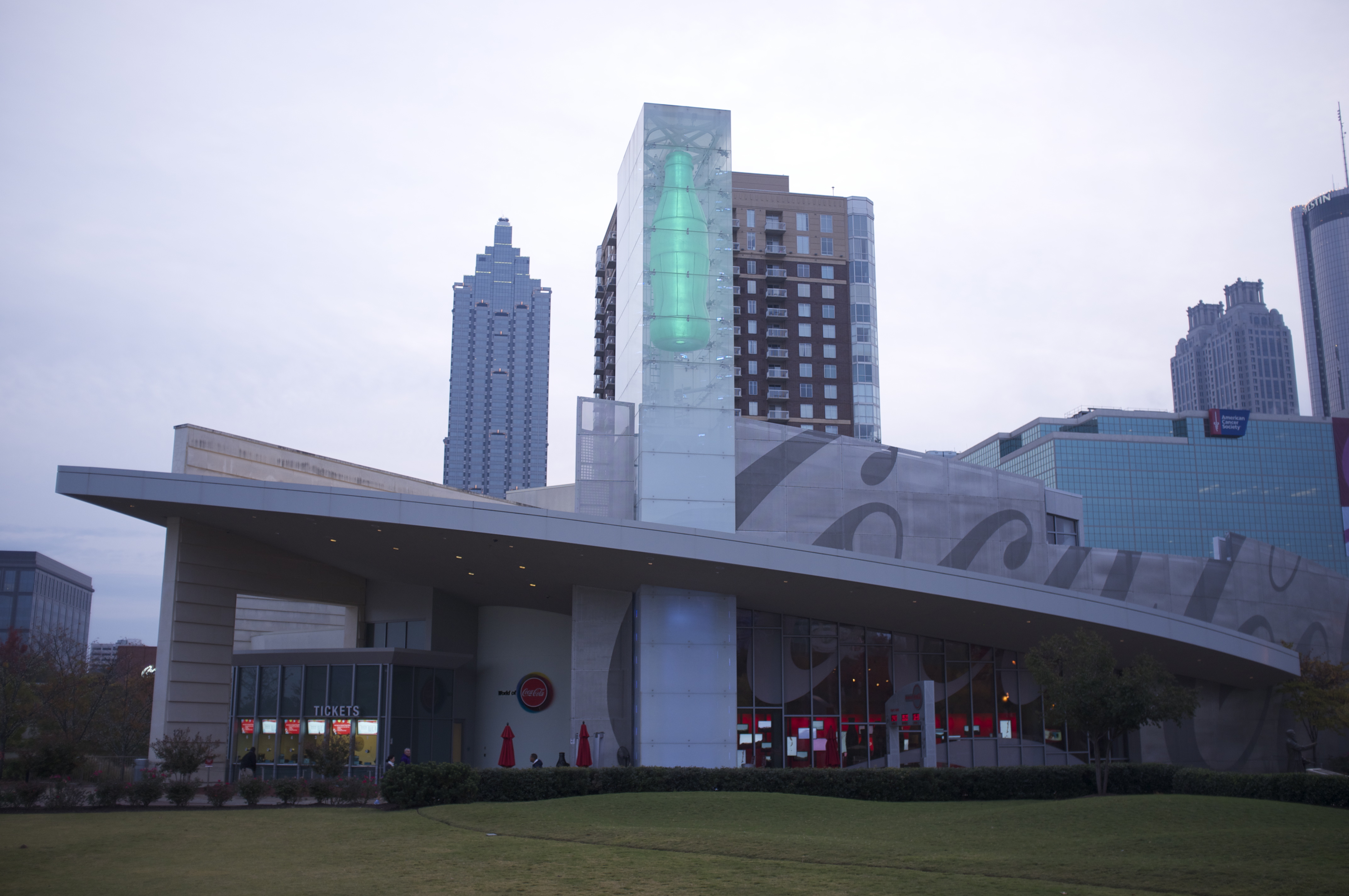 Atlanta